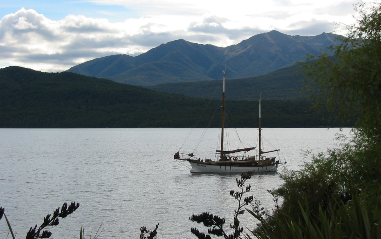 Lake Te Anau in Te Anau - New Zealand